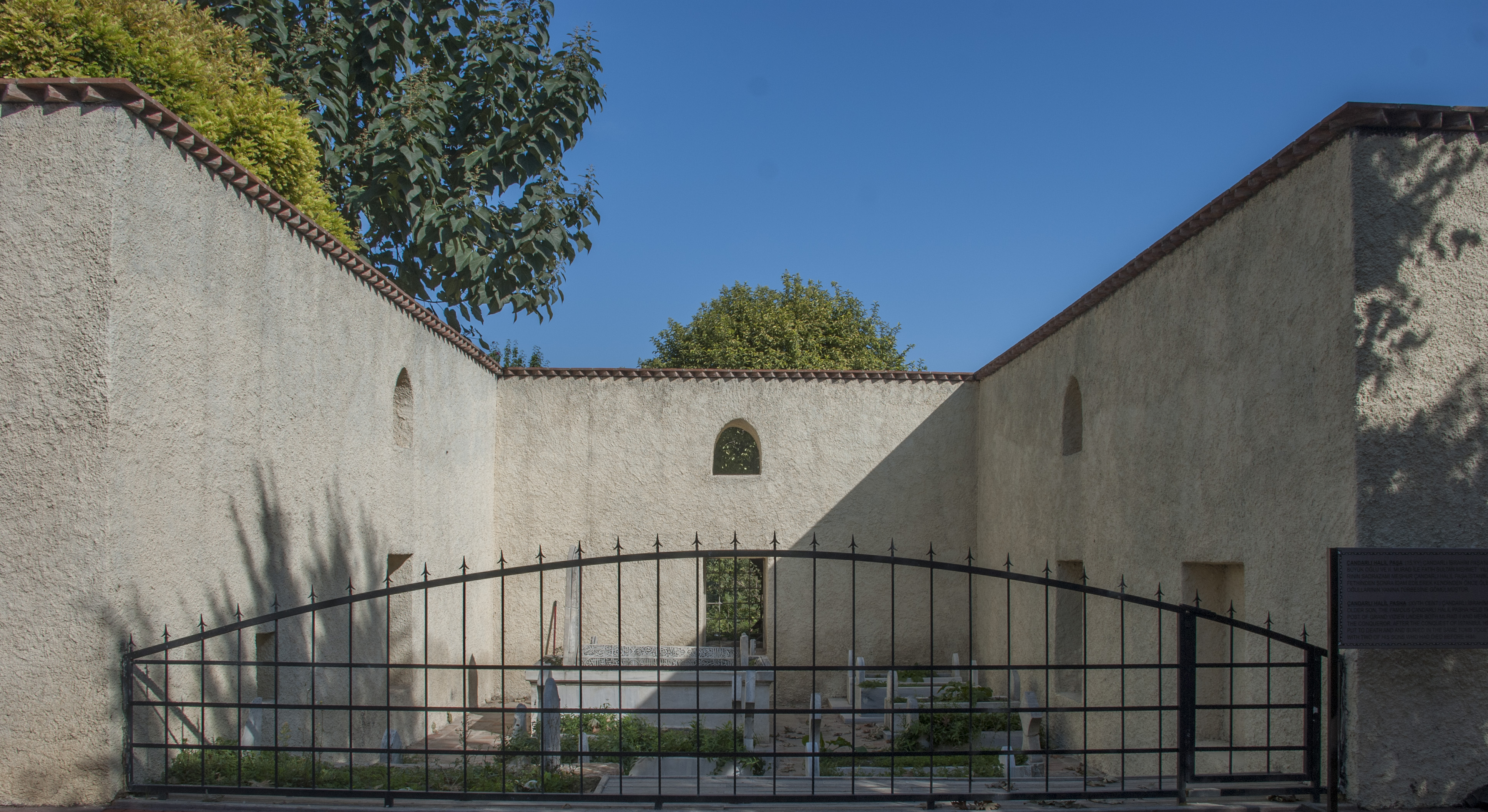 Çandarlı ailesinin İznik'teki türbesi.